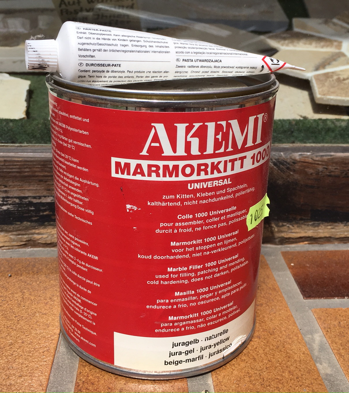 Zweikomponentiger Steinkitt auf Polyester-Basis. Dieser Steinkitt wird zum Verbinden von Naturstein und von Fehlstellen in Natursteinoberflächen verwendet.